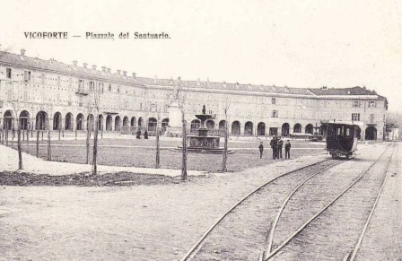 Santuario di Vicoforte - Stazione tram